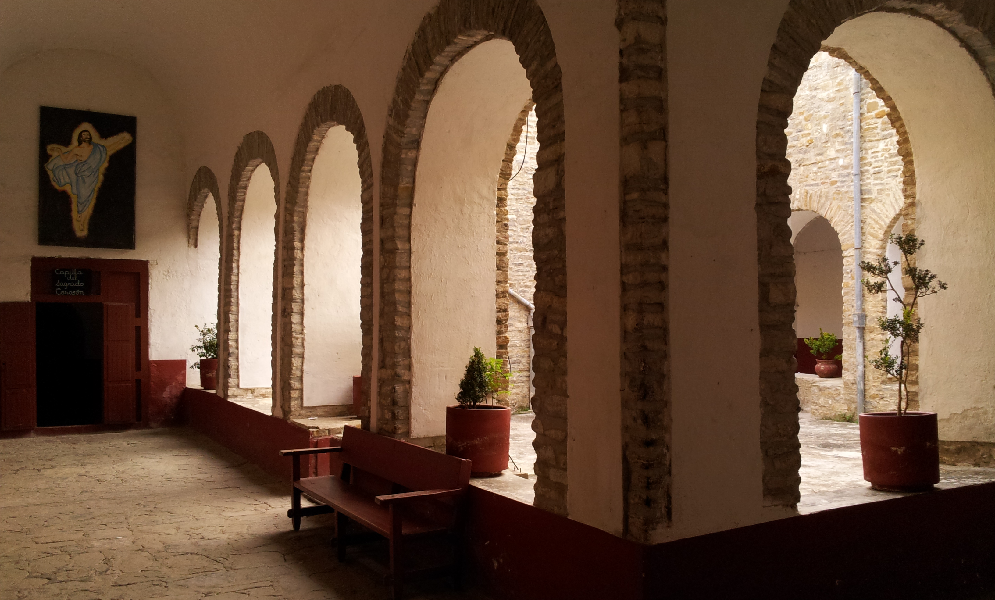 Catedral de Huejutla 2.1 (Android).